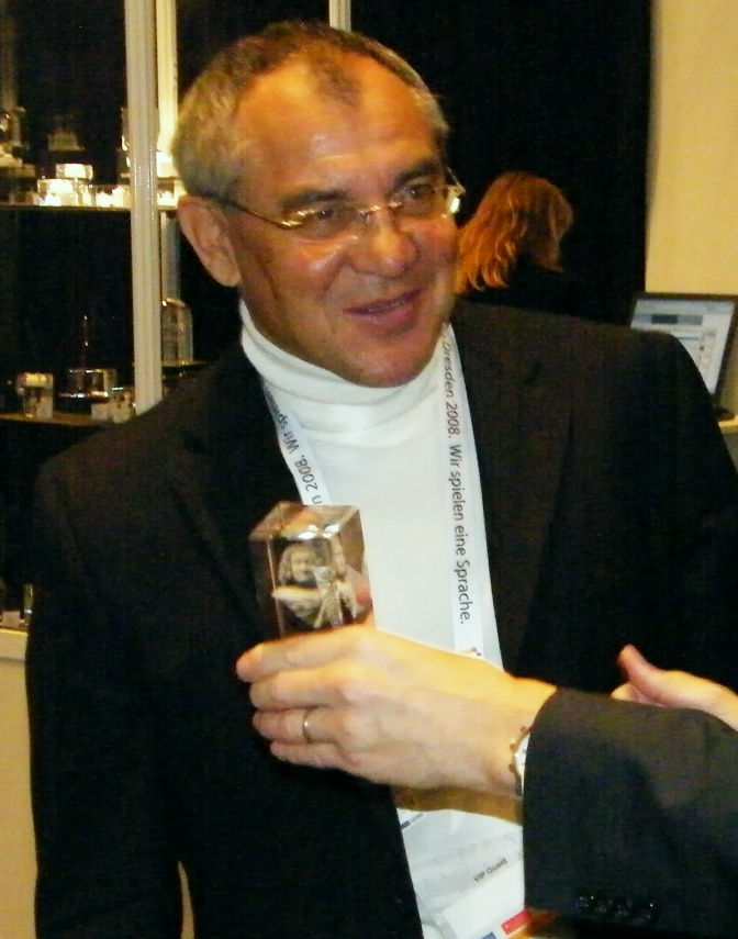 Felix Magath bei der 38. Schacholympiade in Dresden 2008